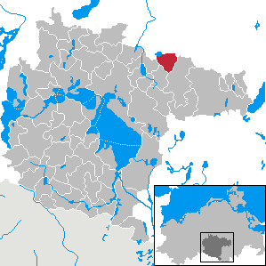 Varchentin im Landkreis Müritz, Mecklenburg-Vorpommern